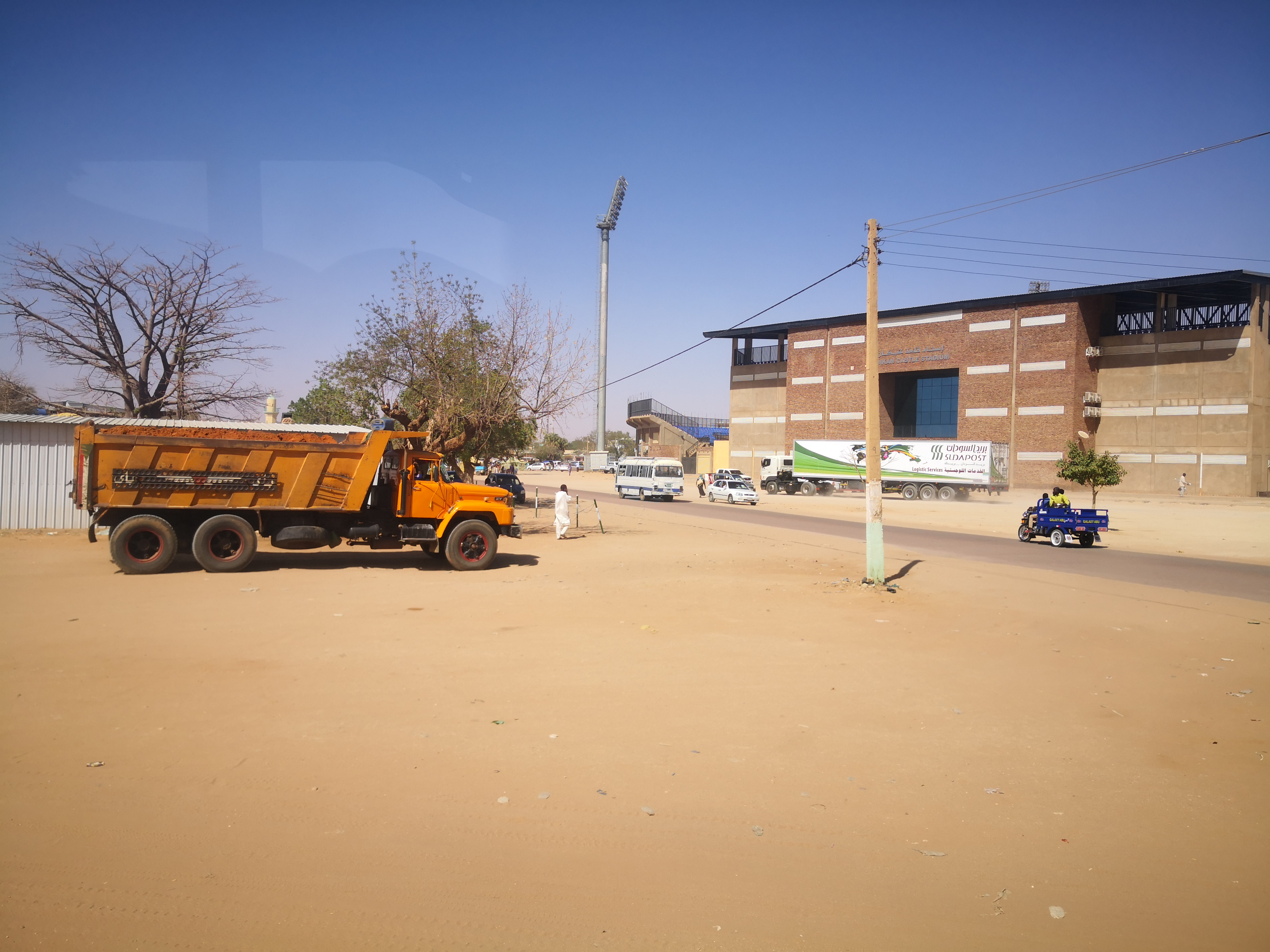 ناقلة لحمل الحجار والتراب والطين وناقلة البريد وعربة صغيره وناقلة مواصلات مدينة الأبيض ملعب قلعة شيكان WLASudan2020 This is an image with the theme "Africa on the Move or Transport" from: Sudan